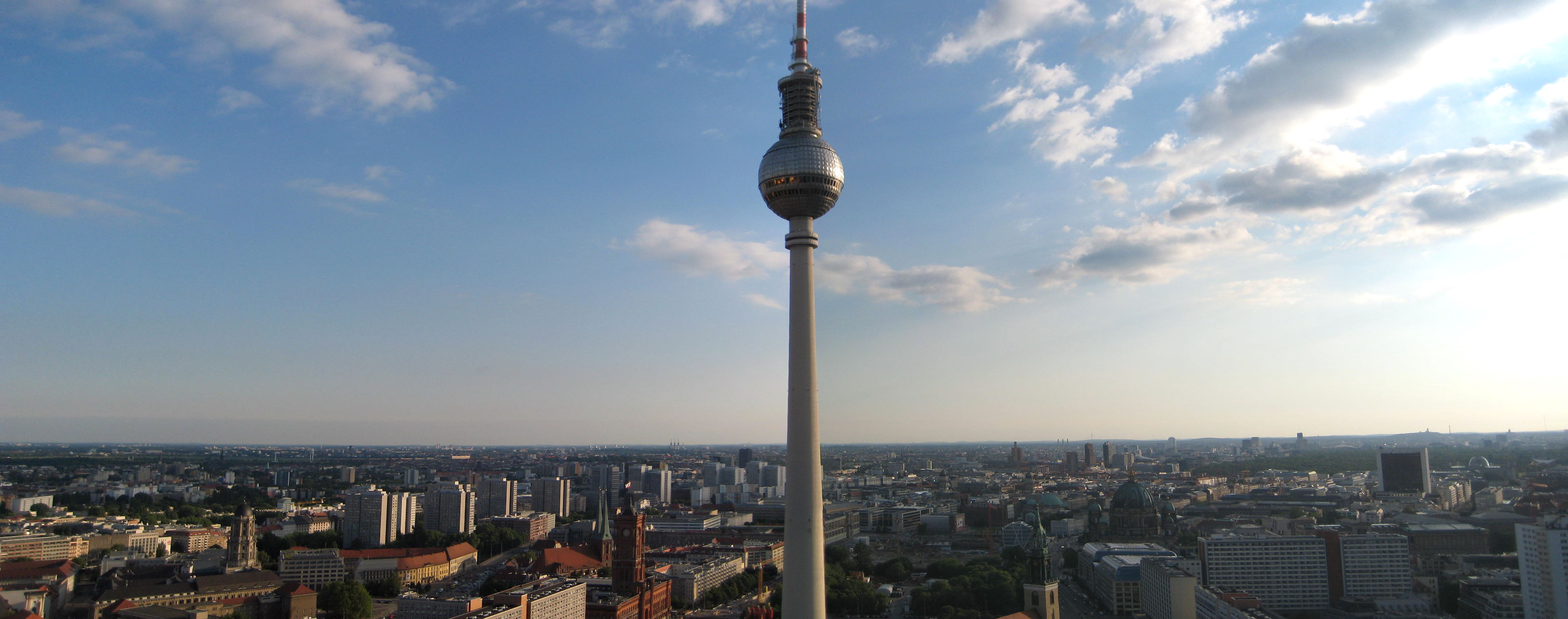 Stadtpanorama Berlin. Zu sehen: Rotes Rathaus, Berliner Dom, Tiergarten und Reichstag.